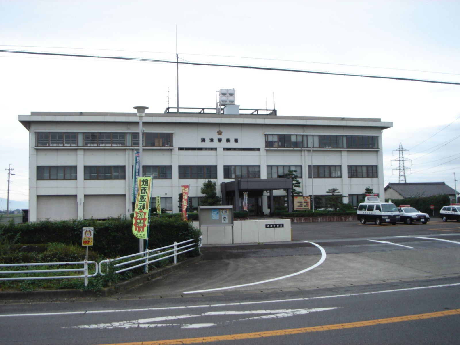 Kaizu Police station(海津警察署),Kaizu,Gifu,Japan(岐阜県海津市)で撮影。